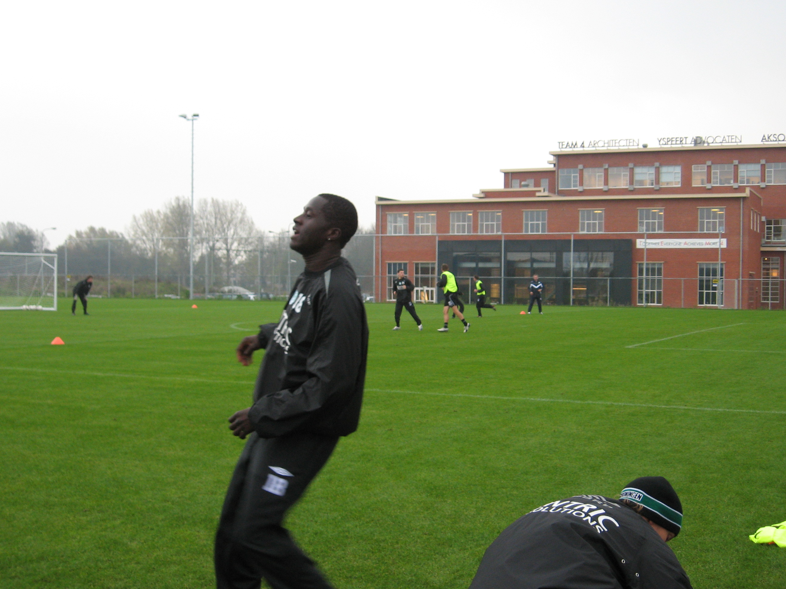 FC Groningen-speler Gibril Sankoh